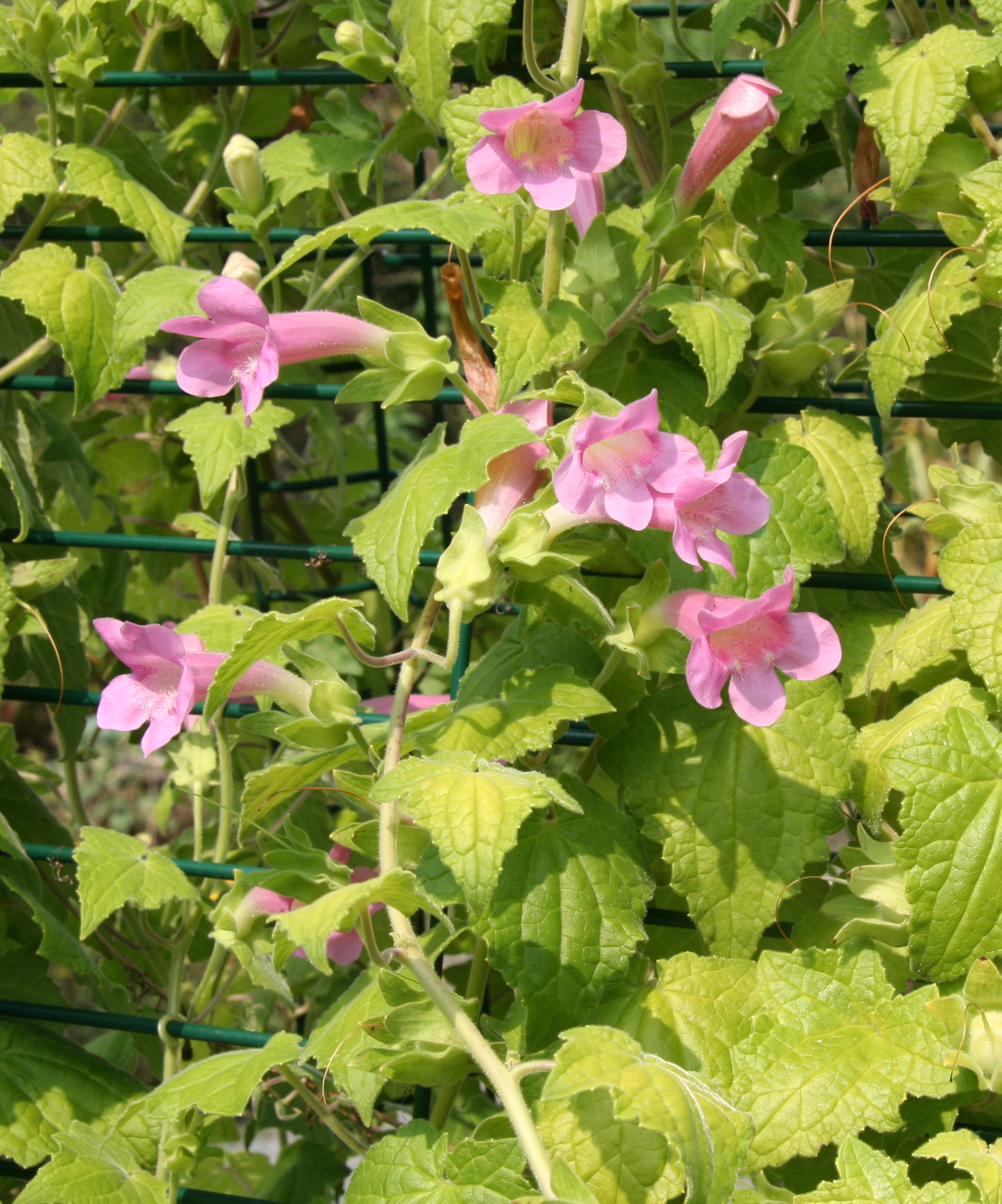 Lophospermum erubescens im Botanischen Garten Dresden